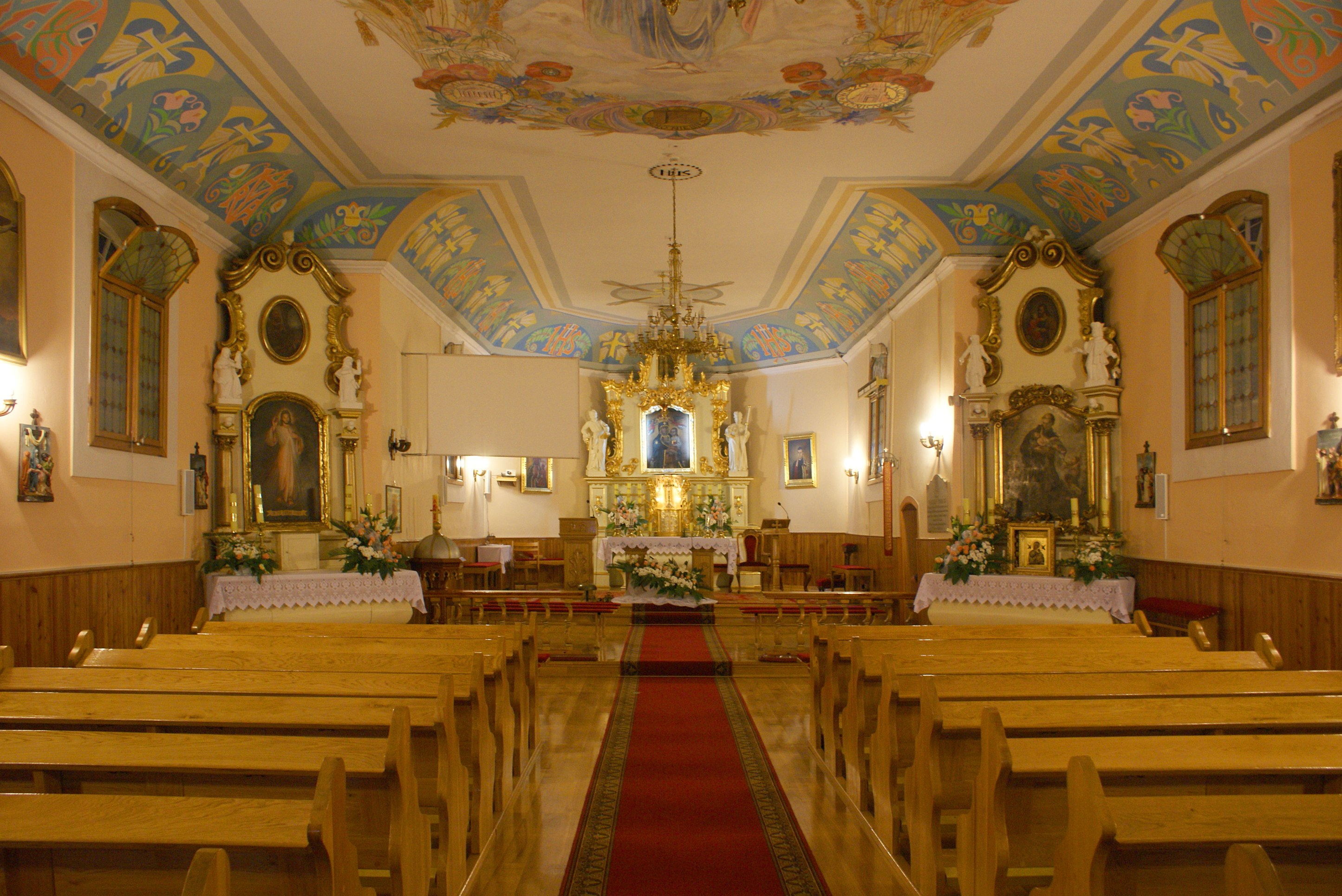 drewniany kościół parafialny pw. Narodzenia NMP z 1785 r., dzwonnica drewniana z 1948 r. Ociąż, Nowe Skalmierzyce IV-73/63/54.